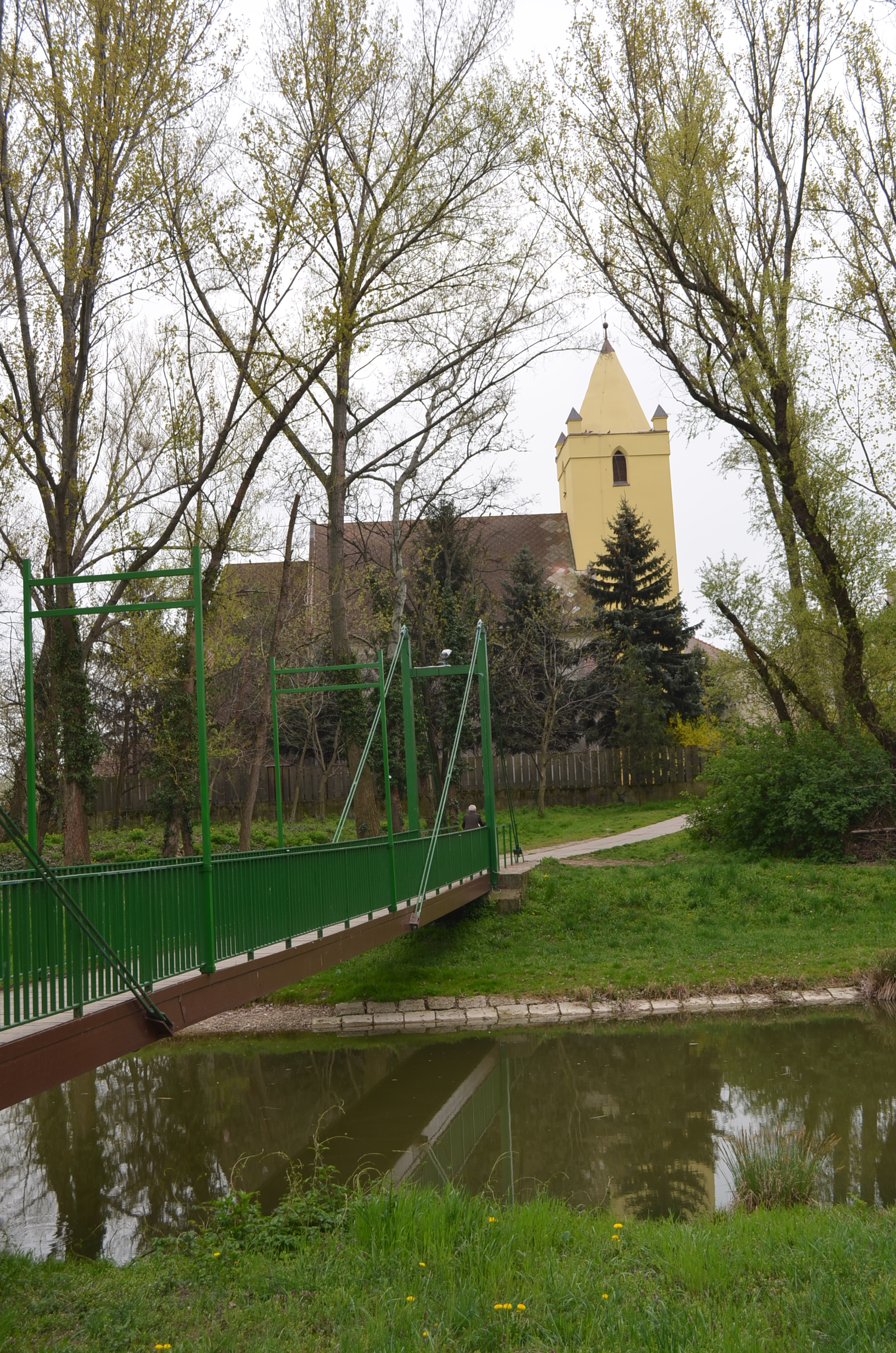 Nyékvárkony